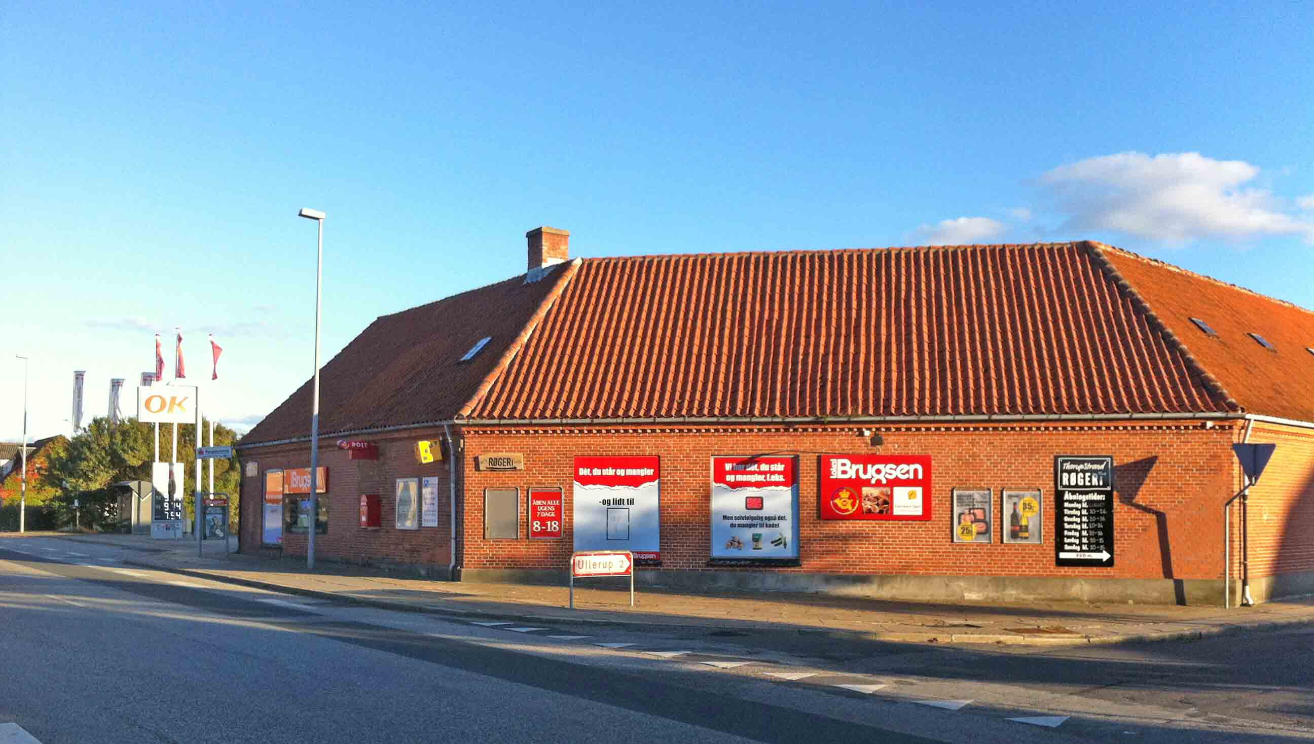 Lokalbrugsen i Vester Torup